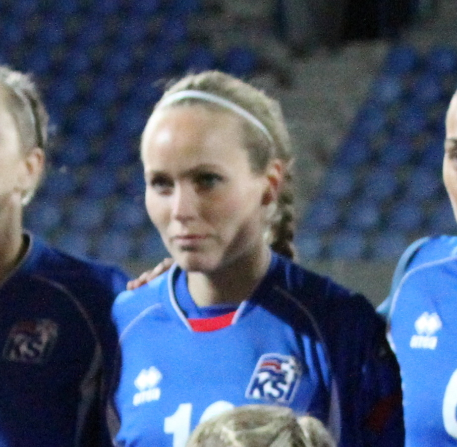 Dóra María Lárusdóttir before Iceland-Ukraine 25/10/2012